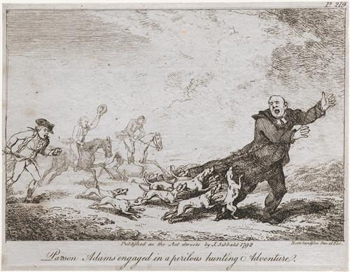 Le pasteur est pris en chasse par la meute du « roasting squire »